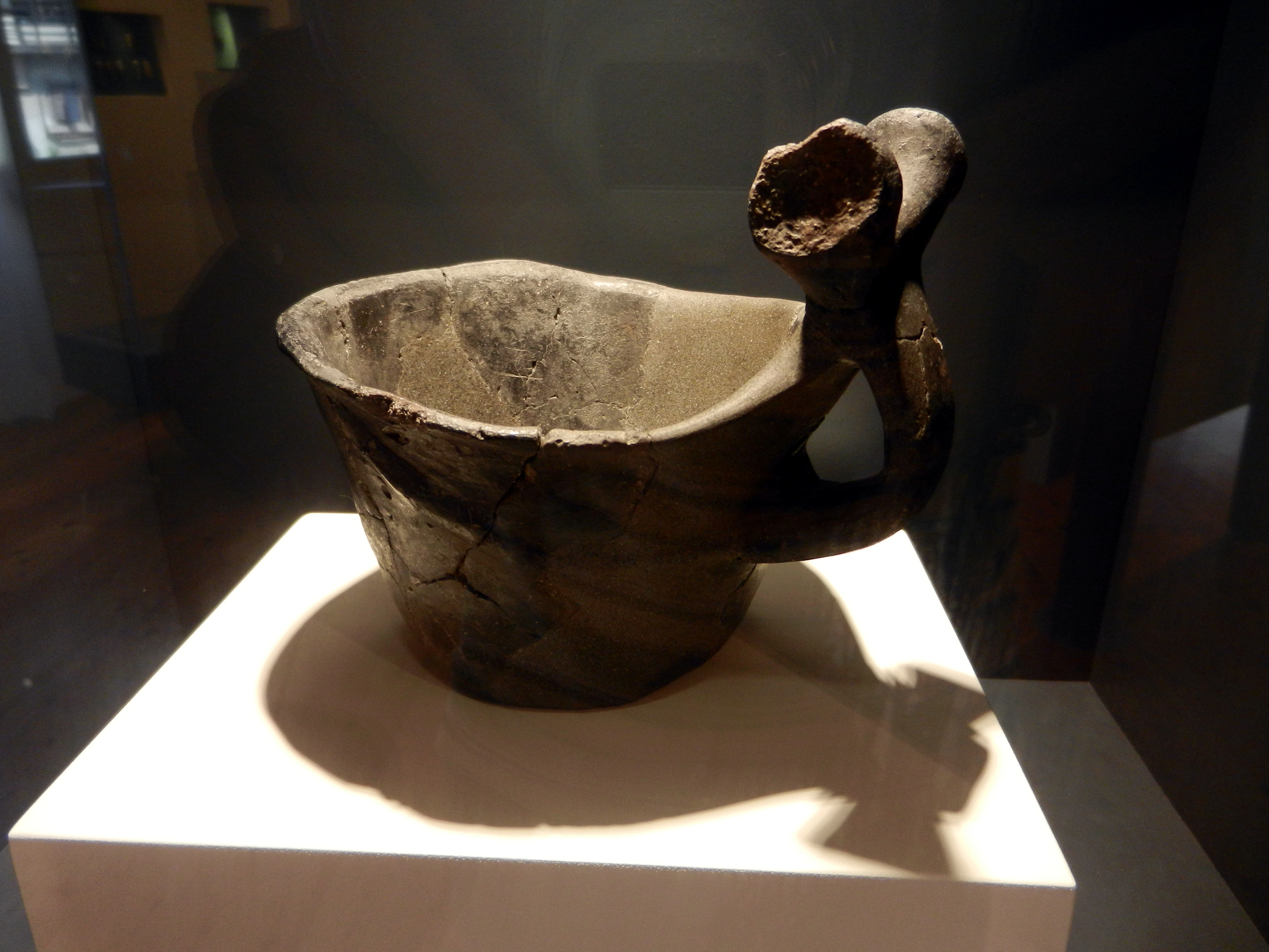 La tazza che ha ispirato il simbolo presente sullo stemma del comune di Fiavè. Attualmente si trova al Museo delle palafitte di Fiavè.